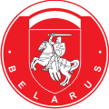 Эмблема на автомобильном номере Республики Беларусь 1992 г.